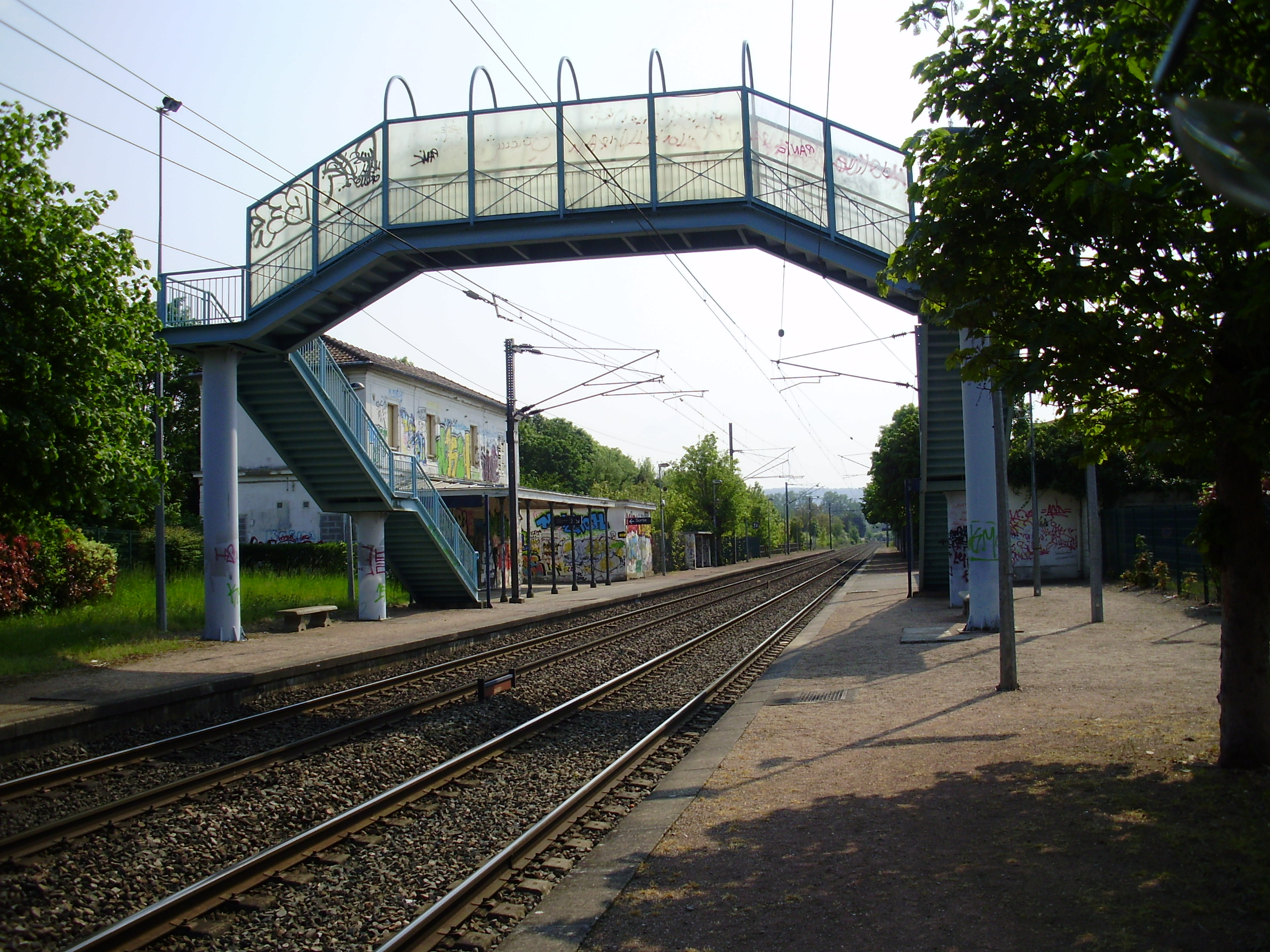 Gare de Boran-sur-Oise, Oise, France : vue en direction de la gare de Persan - Beaumont depuis l'extrémité nord du quai pour Creil